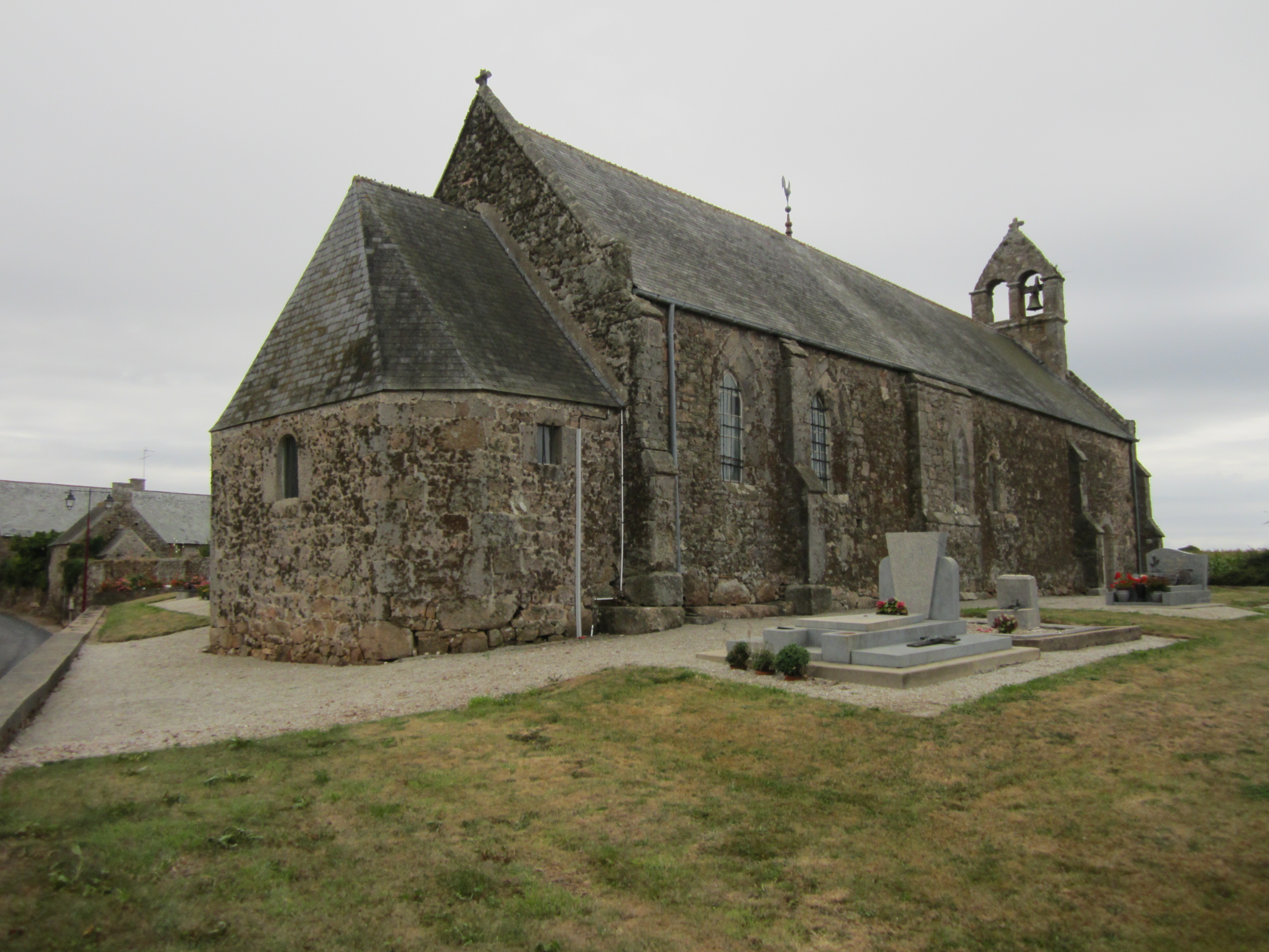 Angoville-en-Saire, commune associé de Cosqueville, Manche